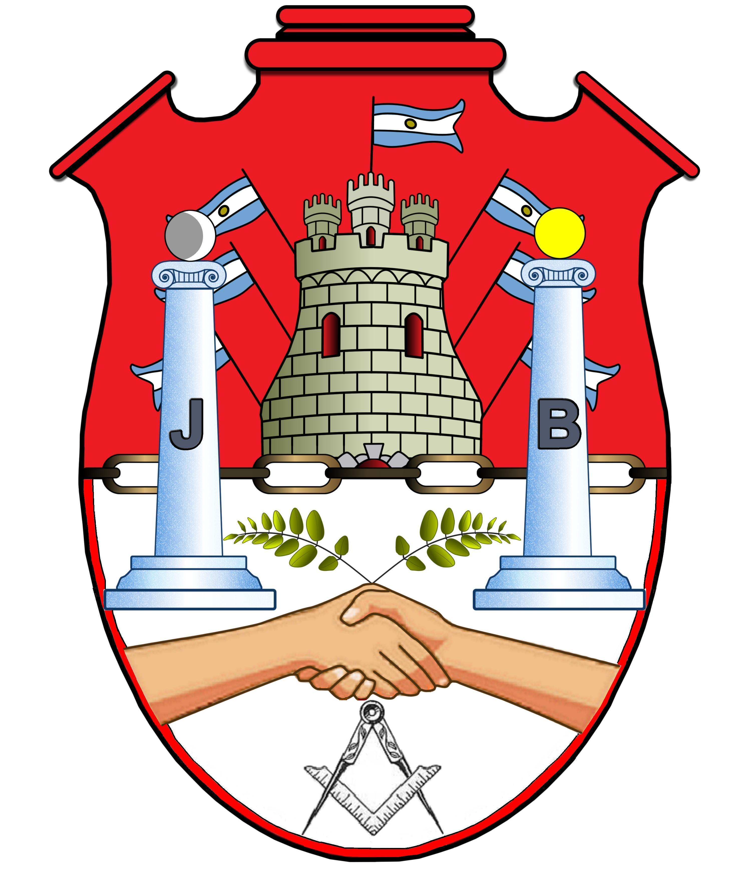 Escudo de la Gran Logia Simbólica Argentina. Antes se utilizó en la disuelta Obediencia argentina llamada GOCRA.